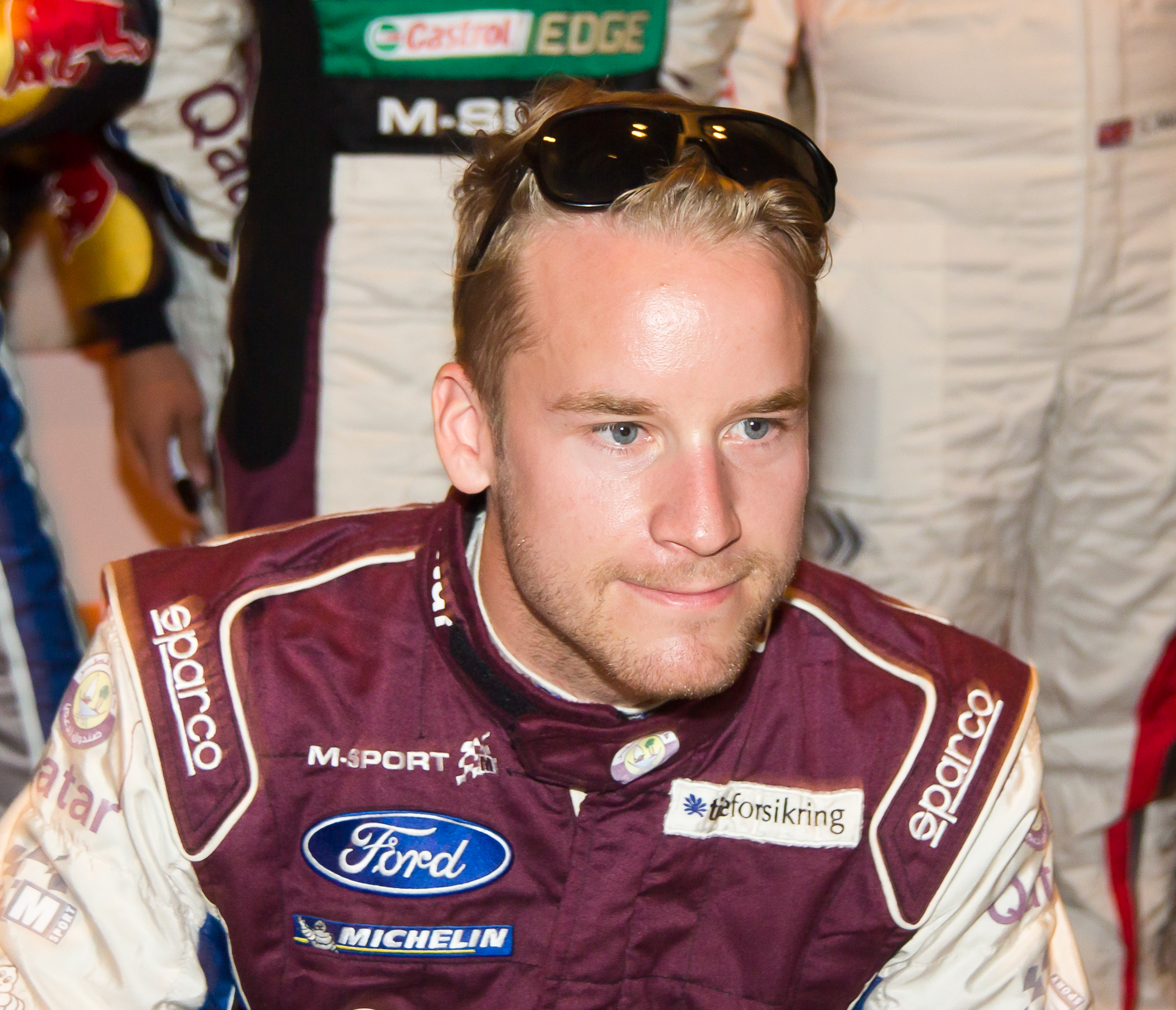 ADAC Rallye Deutschland 2013 - Empfang der Stadt Köln - Mads Østberg